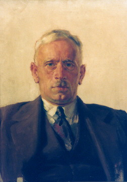 prof. Roman Rybarski, 1936 wykładowca Uniwersytetu Warszawskiego olej, płótno, 65 x 50 cm